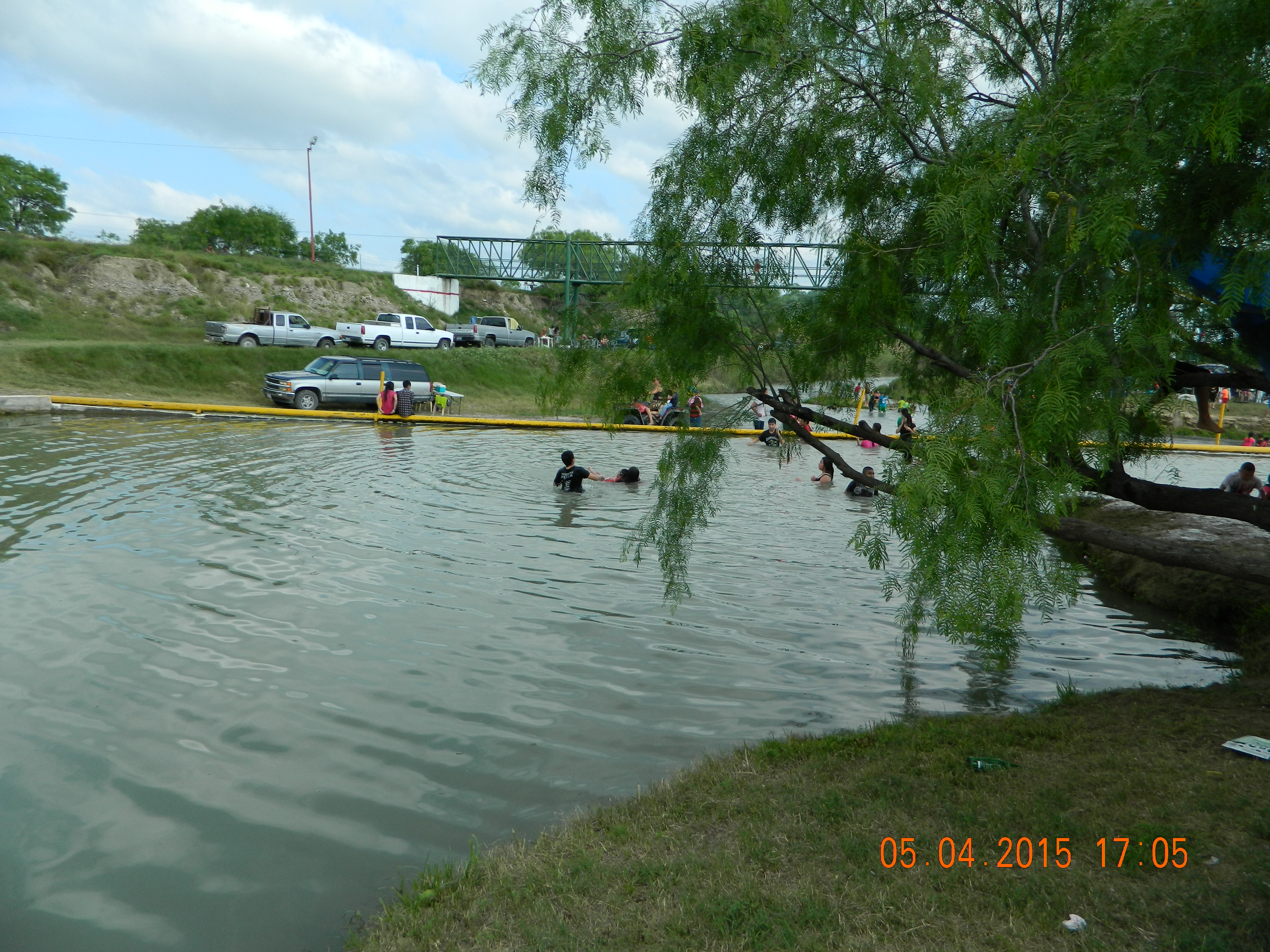 El Parian, 88390 Cd Mier, Tamps., Mexico